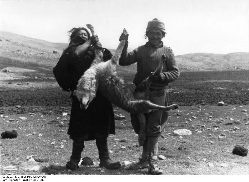 Gyaukang, tibetischer Wolf mit Pansi